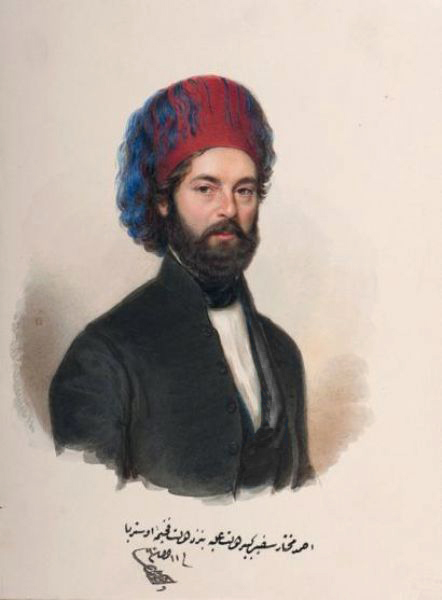 Ahmed Mouhtar Bey, Botschafter der Pforte in Wien.